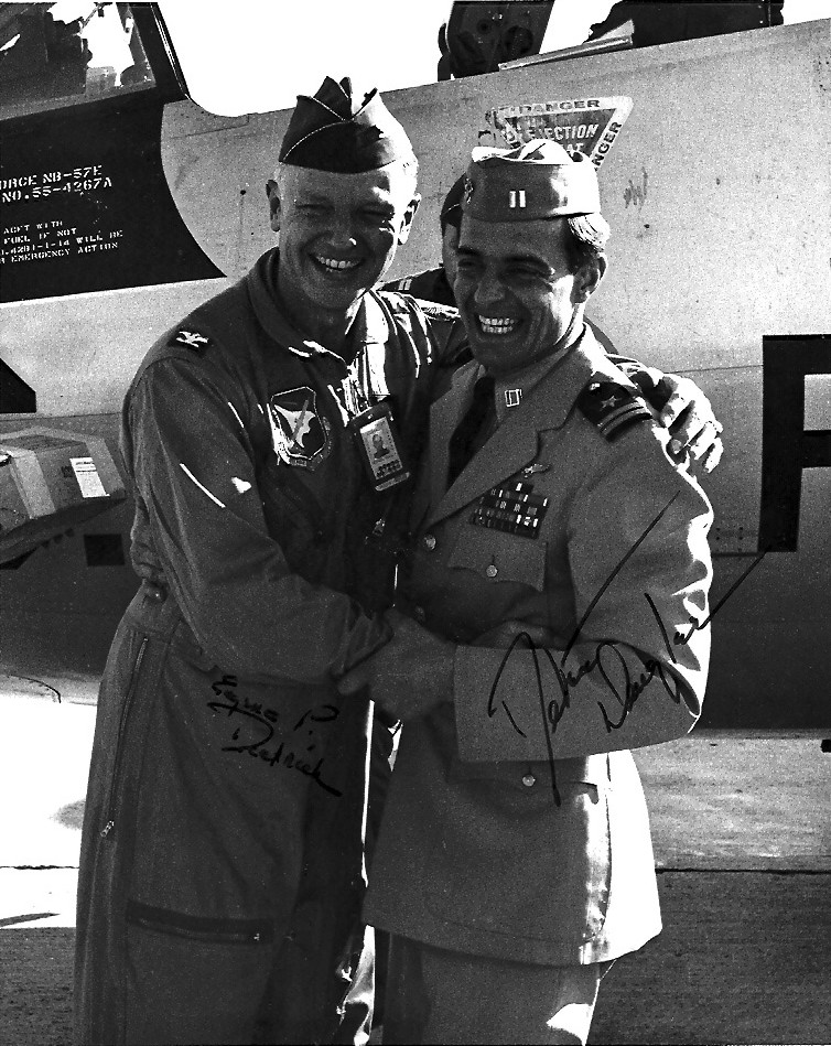 Colonel Eugene Deatrick (USAF) and Lieutenant Dieter Dengler (USN) at Miramar Naval Air Station in 1968.